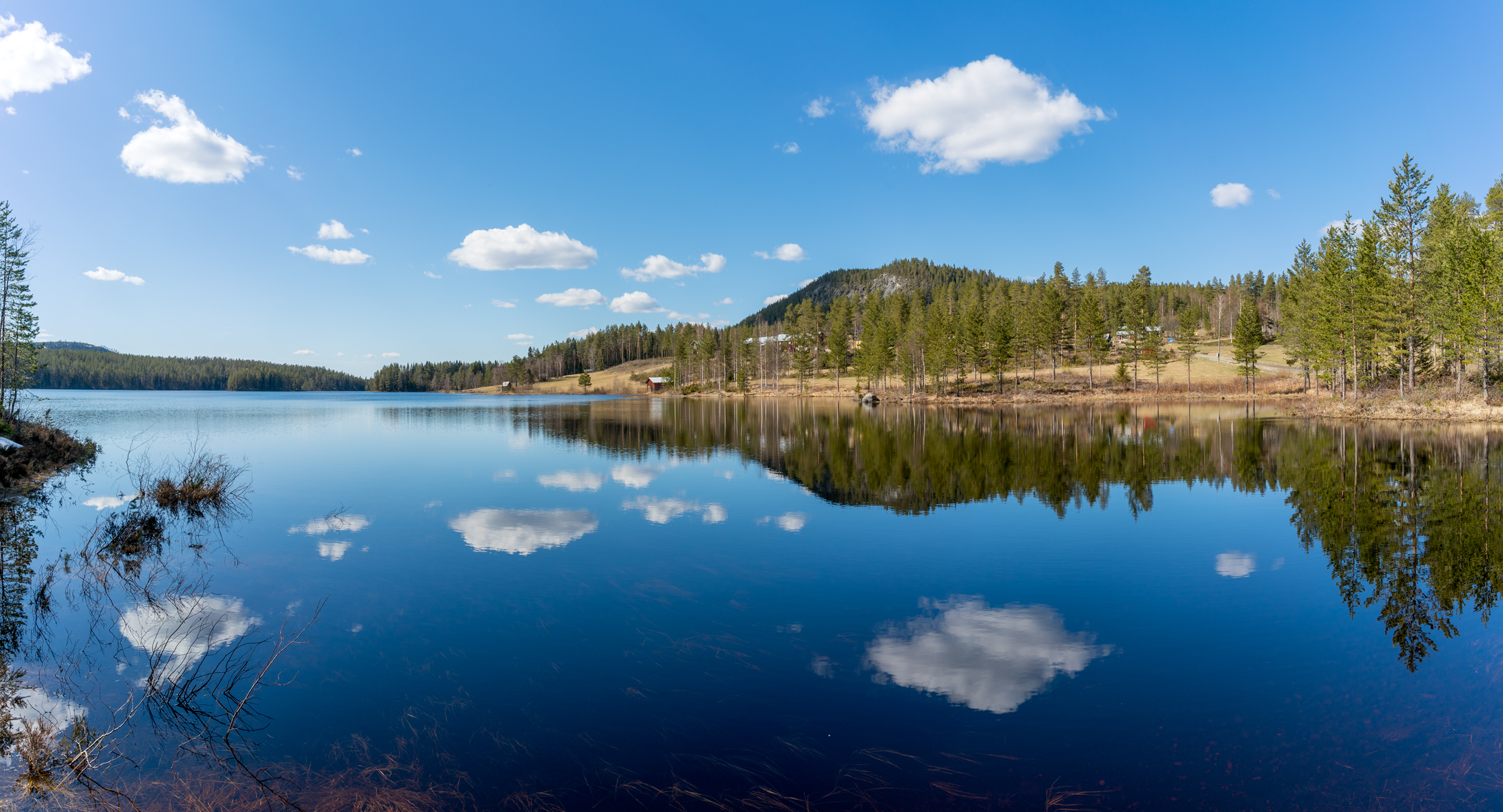 Lockstasjön - vy mot väster.